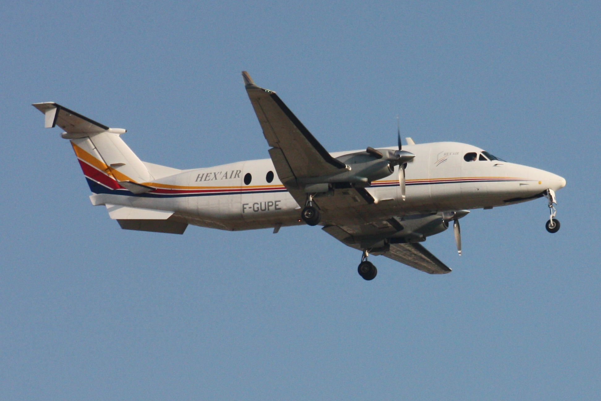 Beechcraft 1900D F-GUPE d'Hex'air en provenance du Puy-en-Velay, en approche finale piste 06 à Orly (LFPO).